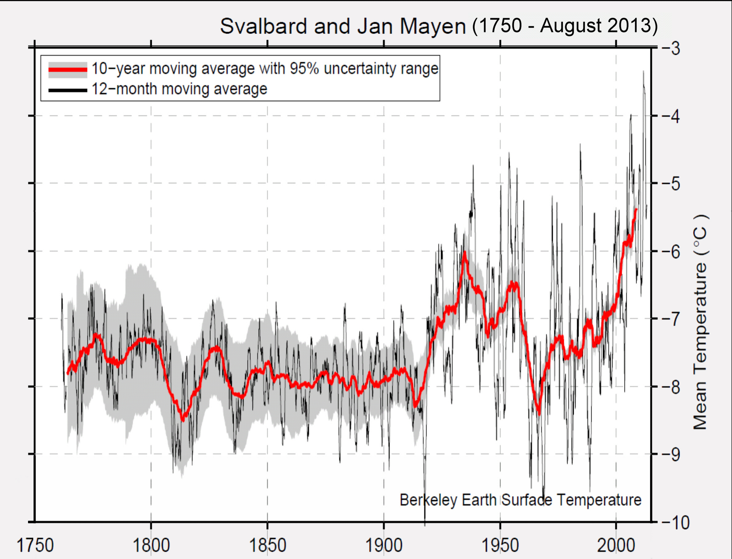 Mittlere Jahrestemperaturen auf Spitzbergen (Inselgruppe) 1750 bis August 2013 als gleitende 12 Monatsmittel. 10-Jahresmittelwerte. - Originaldaten aller Wetterstationen, durch Berkeley Earth (USA) validiert und harmonisert